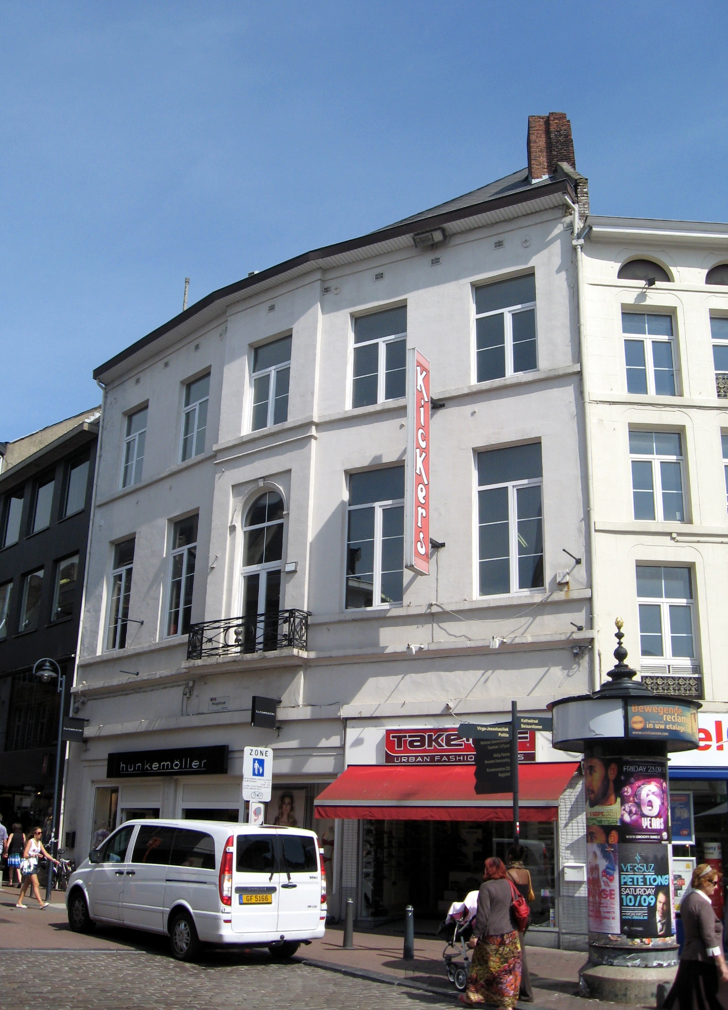 Herenhuis De Helm in Hasselt